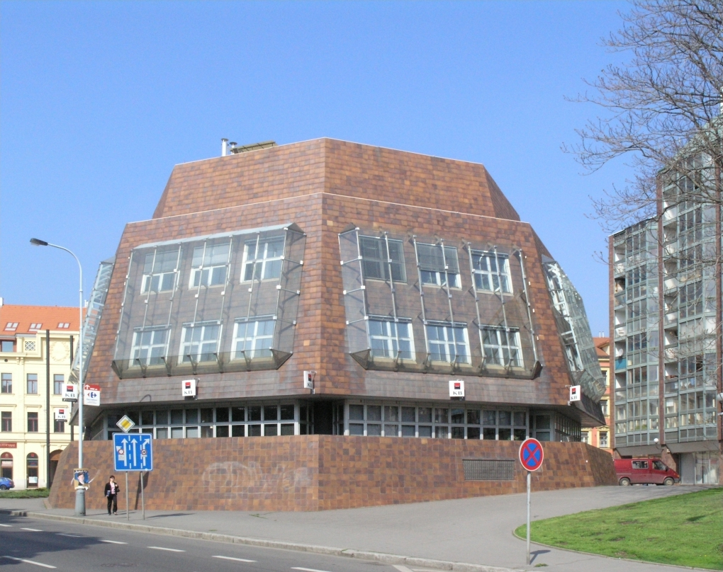 Budova Komerční banky v Praze na Smíchově, architekt Karel Prager